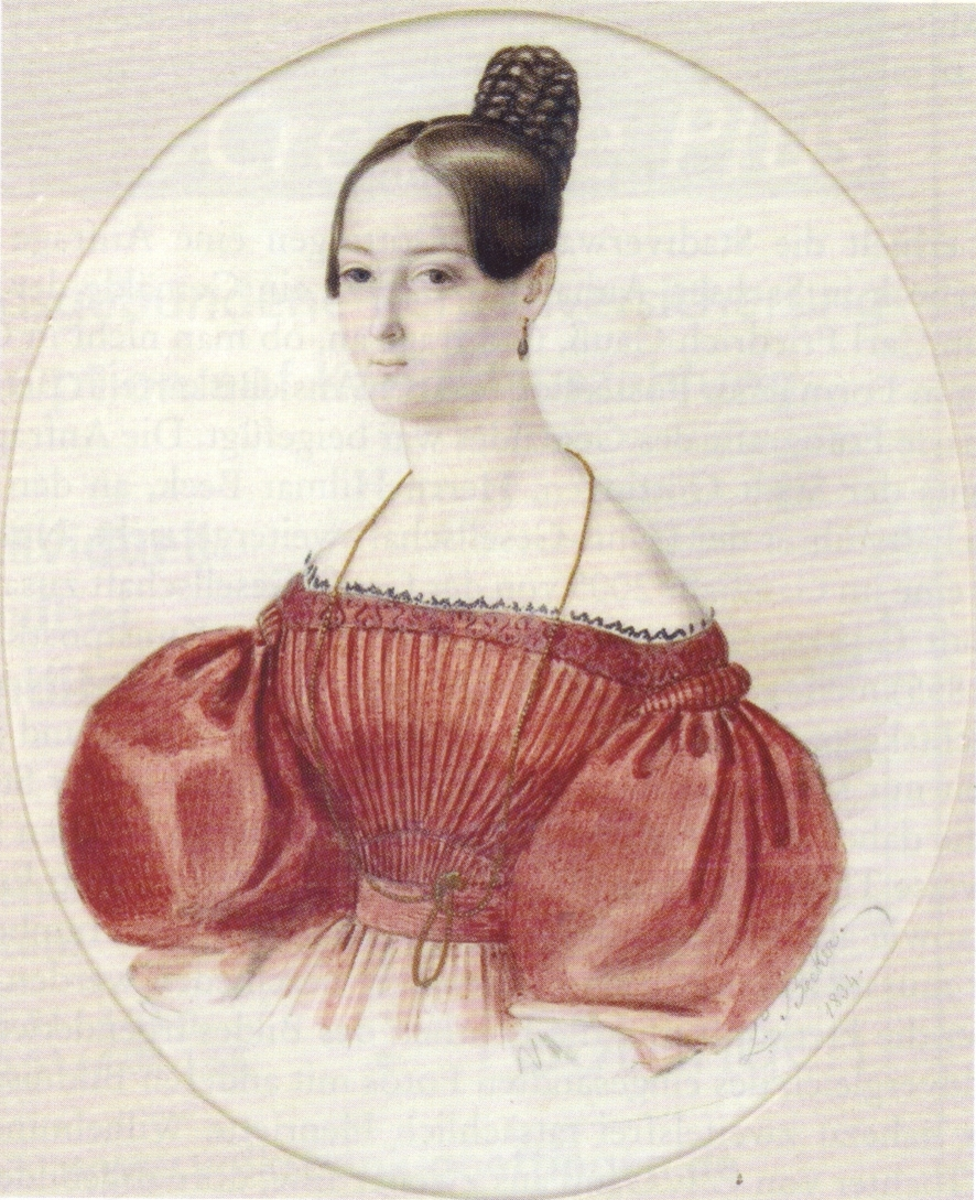 Minna Ewald geb. Gauß im Alter von 26 Jahren. Aquarell von Ludwig Becker (1808–1861), 1834, Städtisches Museum Braunschweig. Signatur: L: Becker. 1834.